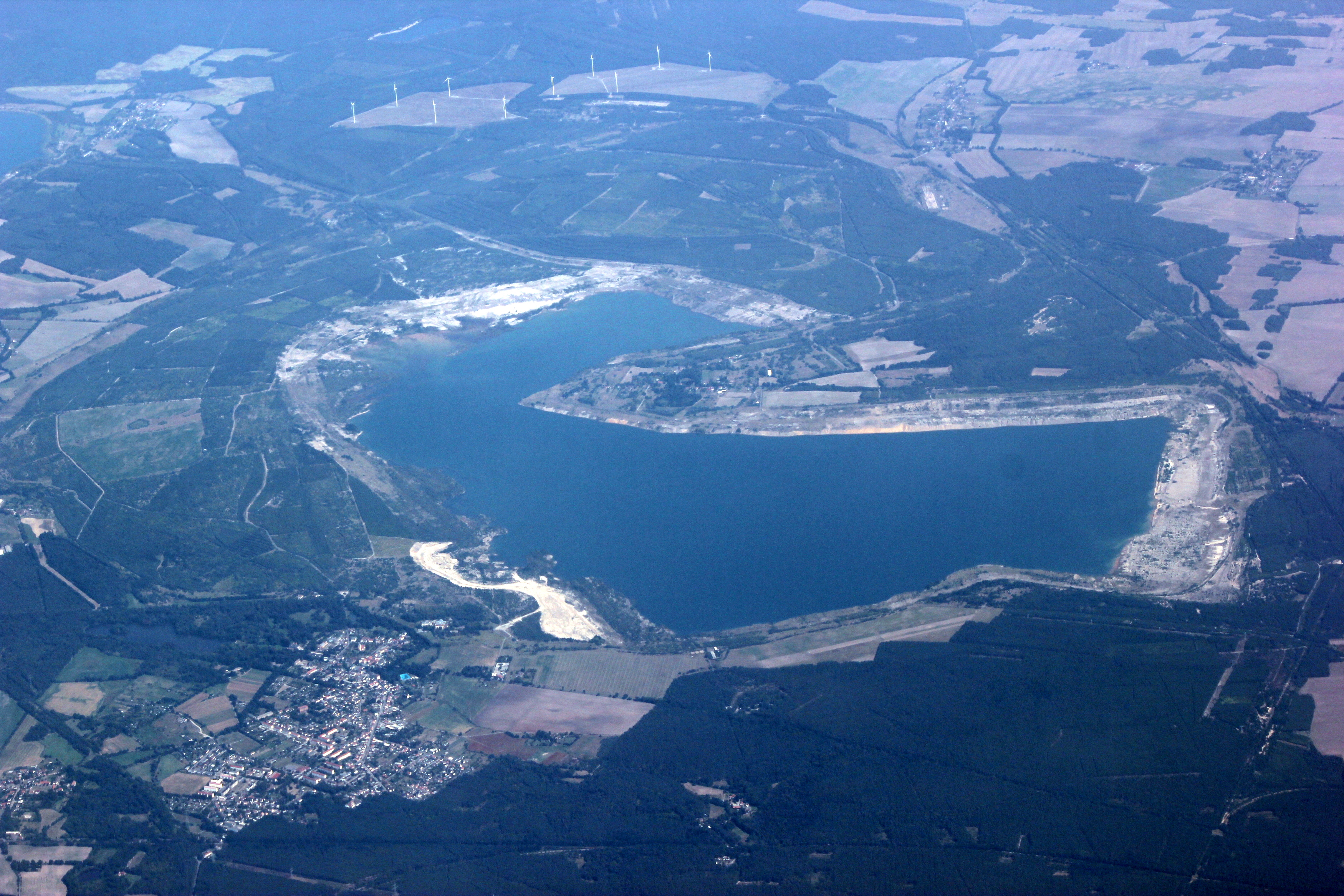 Hornjoserbsce: Powětrowy wobraz Starodarbnjanskeho jězora w Delnjej Łužicy.